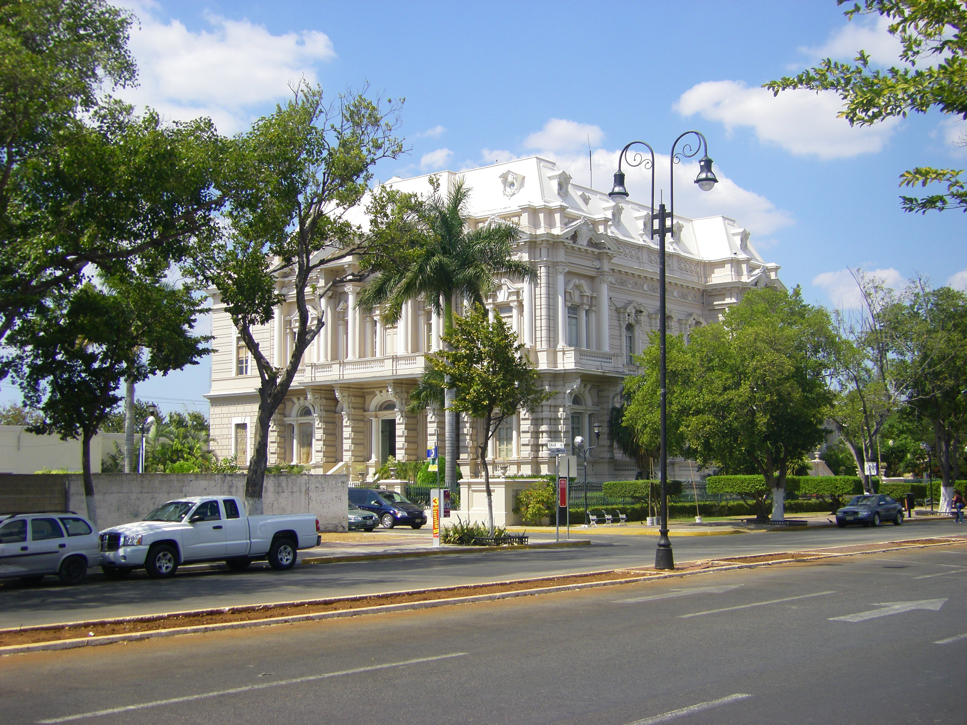 Anthropologisches Museum am Paseo Montejo in Mérida, Mexiko